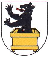 wappen von Trogen AR Schweiz